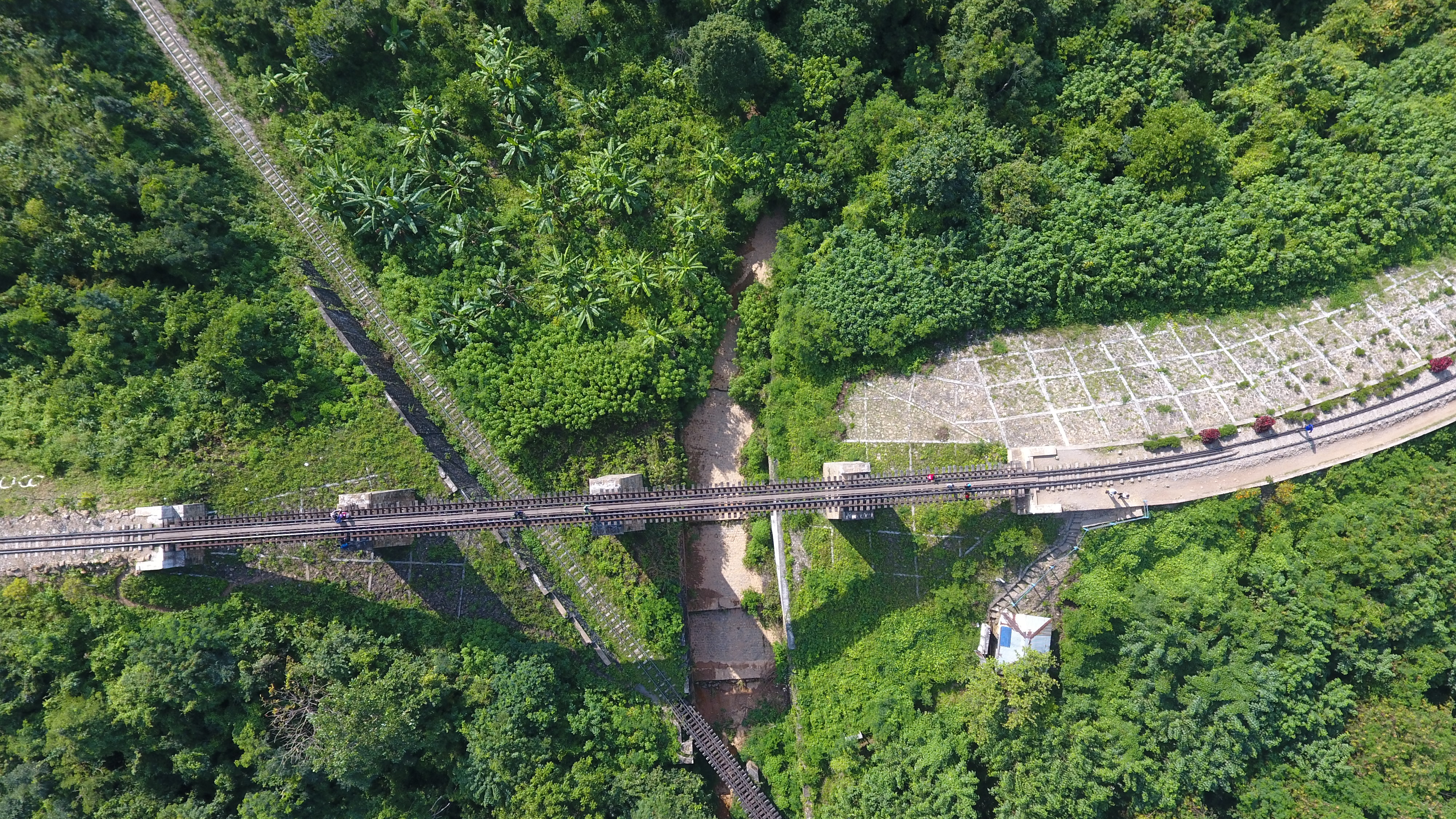 မြန်မာဘာသာ: ဘ၀သံသရာ တံတား